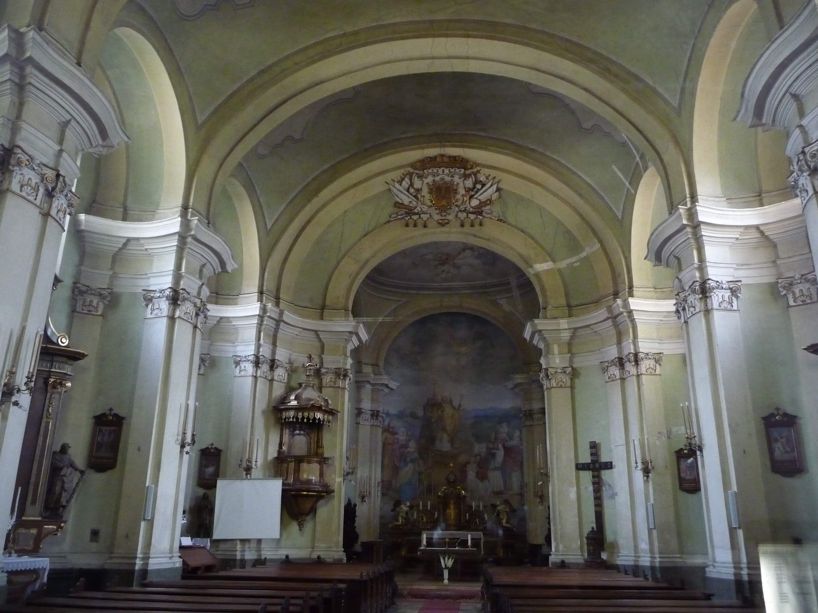 A Szent Adalbert plébániatemplom oldalkápolnája, Hatvan